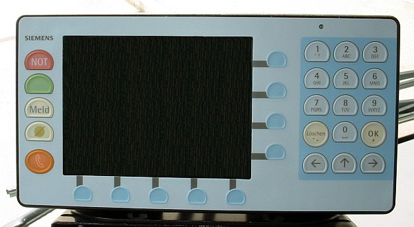 Integriertes Bordinformationssystem (IBIS): Benutzerschnittstelle des Siemens IBISplus (2006) eigenes Foto / alle Rechte freigegeben